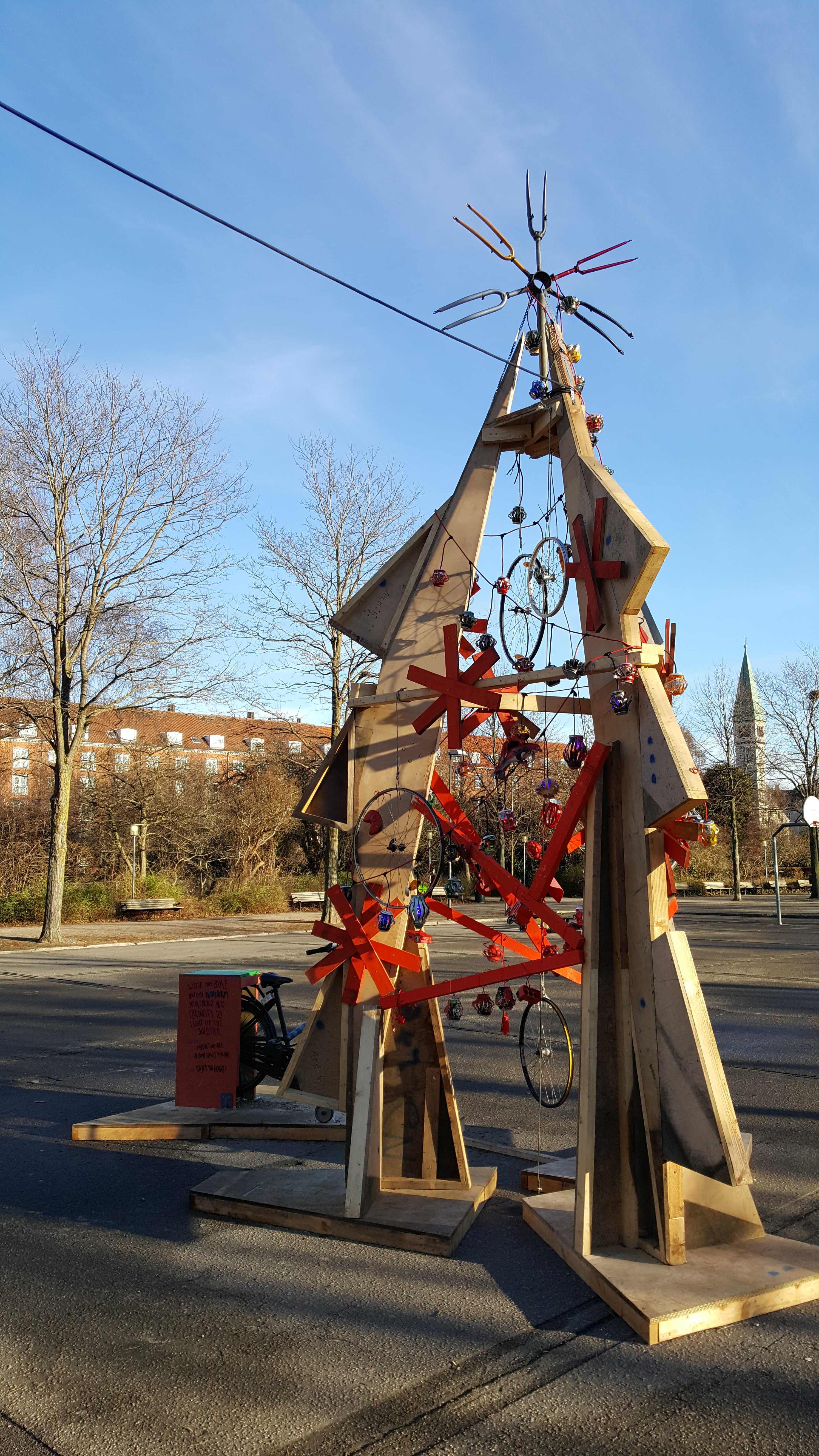 Cykelskulptur foran amfiscenen i Enghaveparken i København. Ved at træde i pedalerne på budcyklen genereres elektricitet, og skulpturens lamper tændes